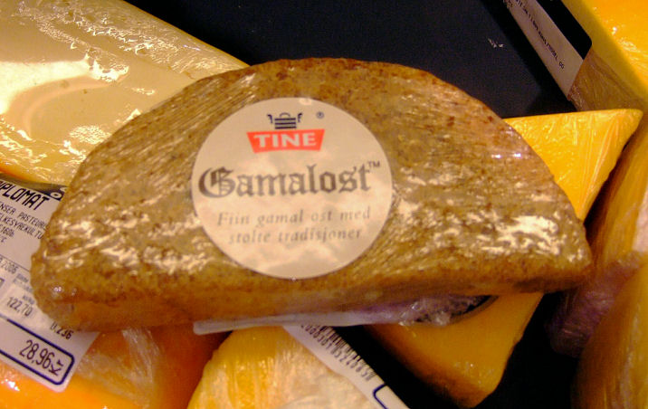 Gamalost - Norwegian cheese